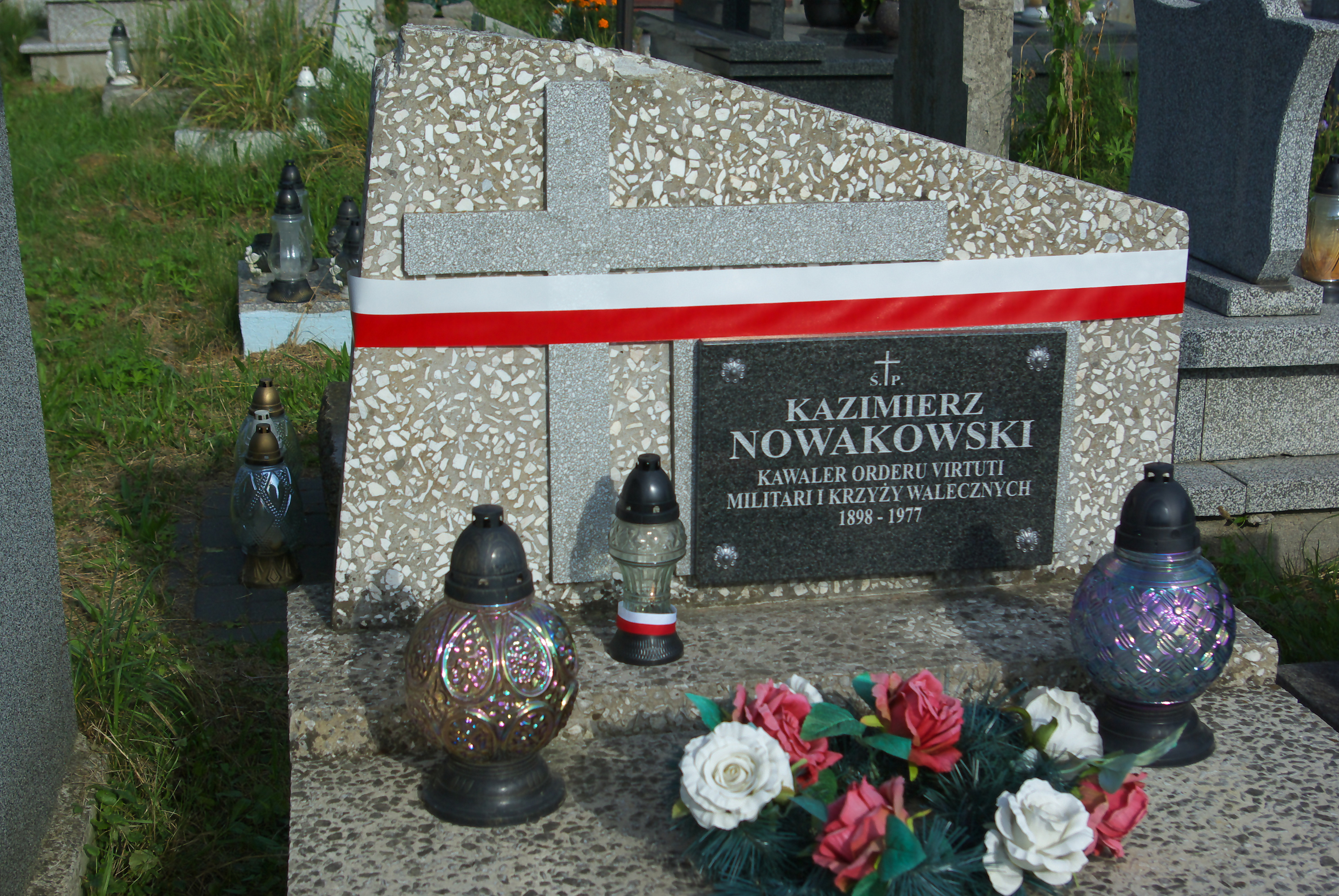 Uroczystości 100. rocznicy Bitwy Warszawskiej (1920-2020) w Sanoku. Grób uczestnika bitwy polsko-bolszewickiej, st. sierż. Kazimierza Nowakowskiego, udekorowany barwami narodowymi.